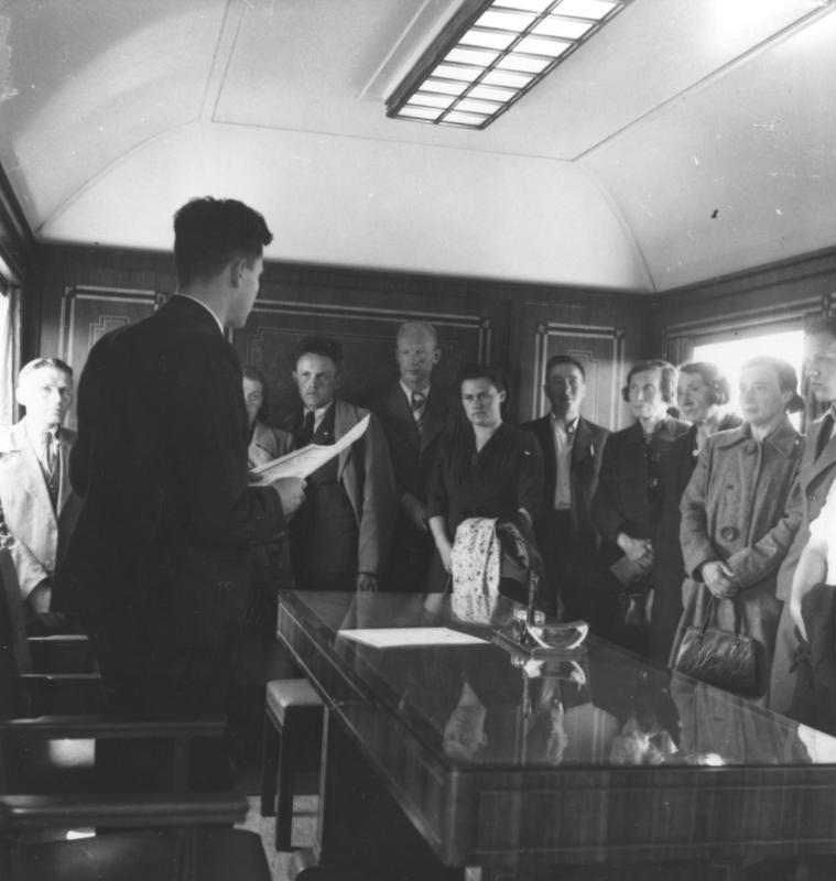 Sonderzug der Einwandererzentralstelle Sonderzug der Einwanderungszentralstelle zur Durchschleusung der Umsiedler: Staatsangehörigkeitsstelle, Urkundenausgabe